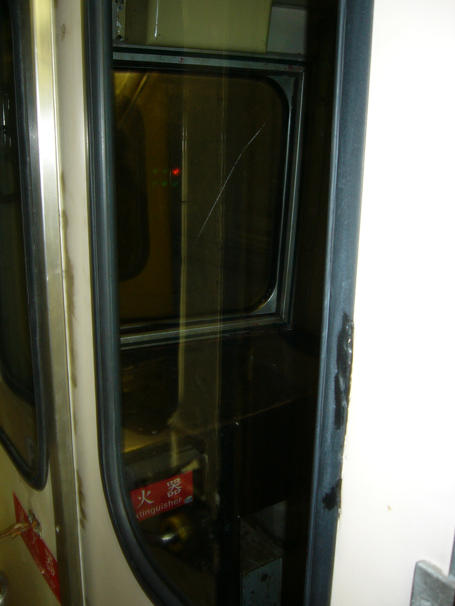 中文（台灣）: 台鐵EMU300型電聯車右駕駛室。